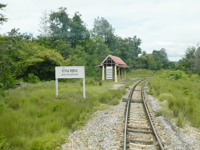 มุมมองขากท้ายขบวนรถ